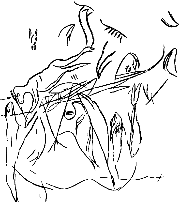 Zambullida ritual de la cueva de Los Casares (Guadalajara, España). Se trata, probablemente, de un ritual chamánico (la representación de la entrada en trance o en el mundo de los espíritus) o de un rito de iniciación.